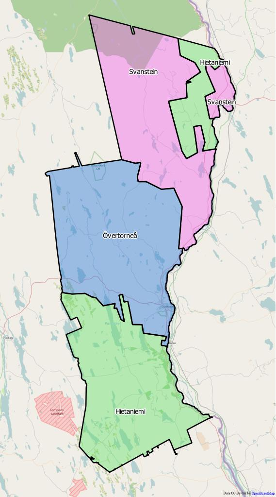 Distriktsindelningen i Övertorneå kommun World file 273.33835899569493222 0 0 -273.33835899569493222 2538586.8938928134739399 10156815.65138190612196922